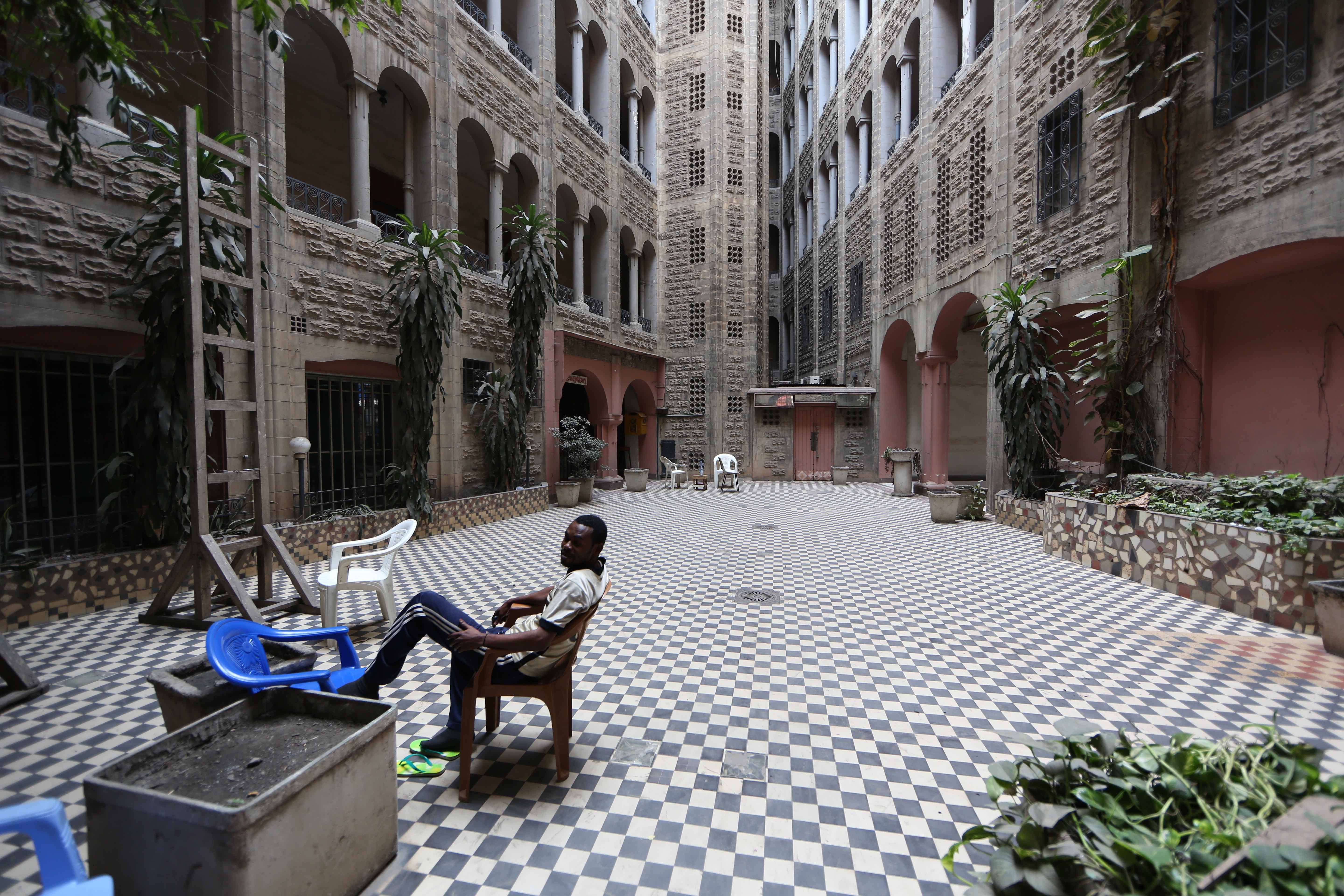 Photo MONUSCO / Abel Kavanagh